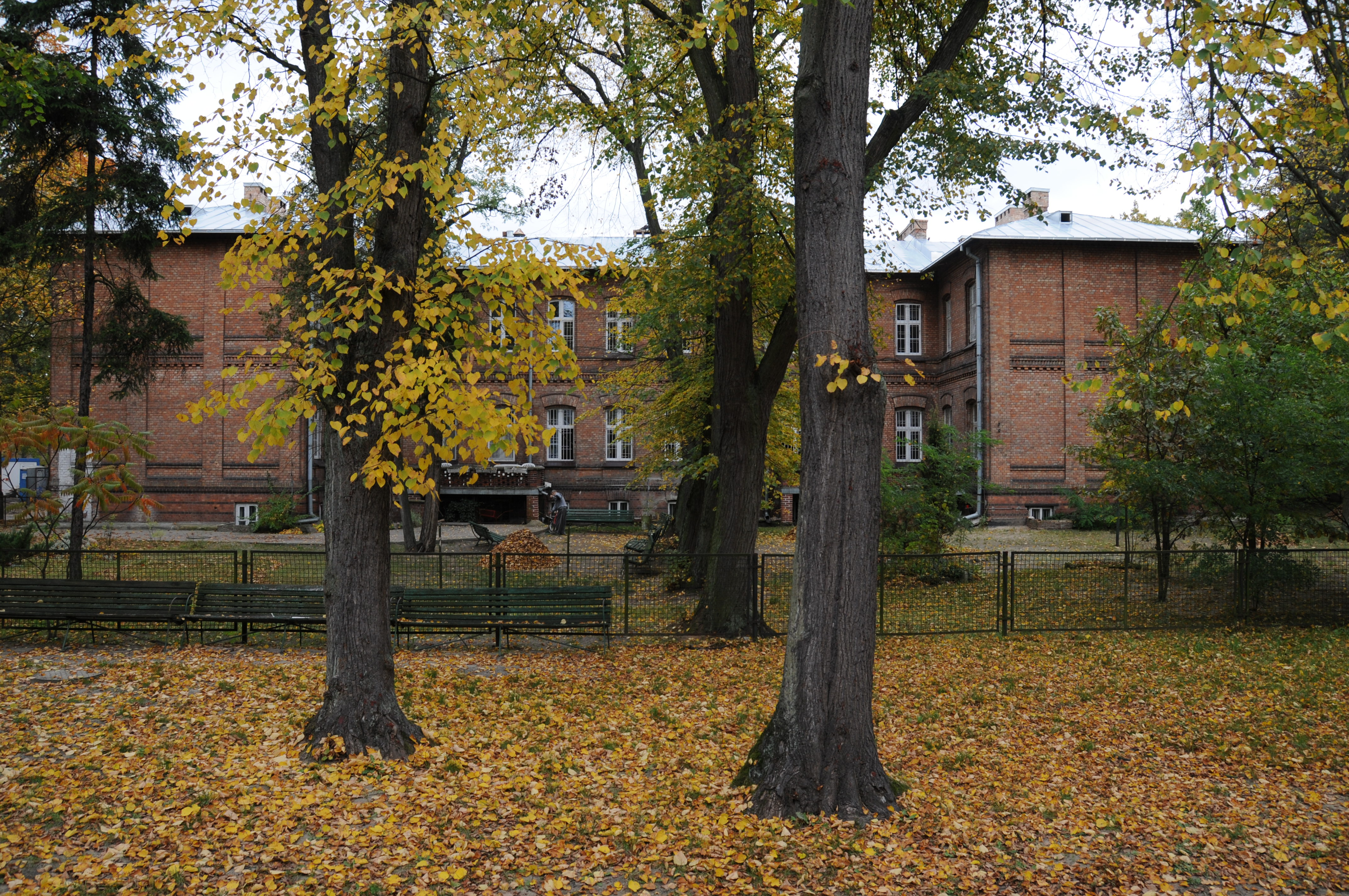 Pawilon III. Siedziba oddziału ogólnopsychiatrycznego, pracowni CT i pierwszej w Polsce pracowni EEG.